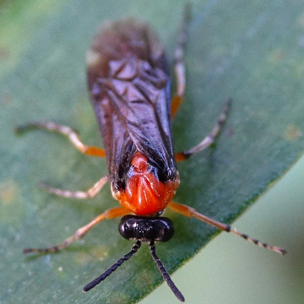 ニホンカブラハバチ 日本・東海地方